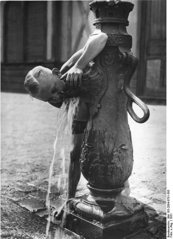 Berlin, Junge trinkt aus Wasserpumpe Scherl: Berlin; Hitze 1931 25223-31 [Junge trinkt an einem Hebelbrunnen]